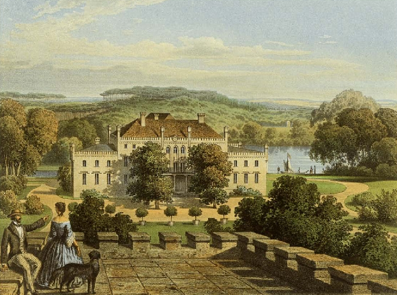 Schloss Doelzig, Kreis Soldin